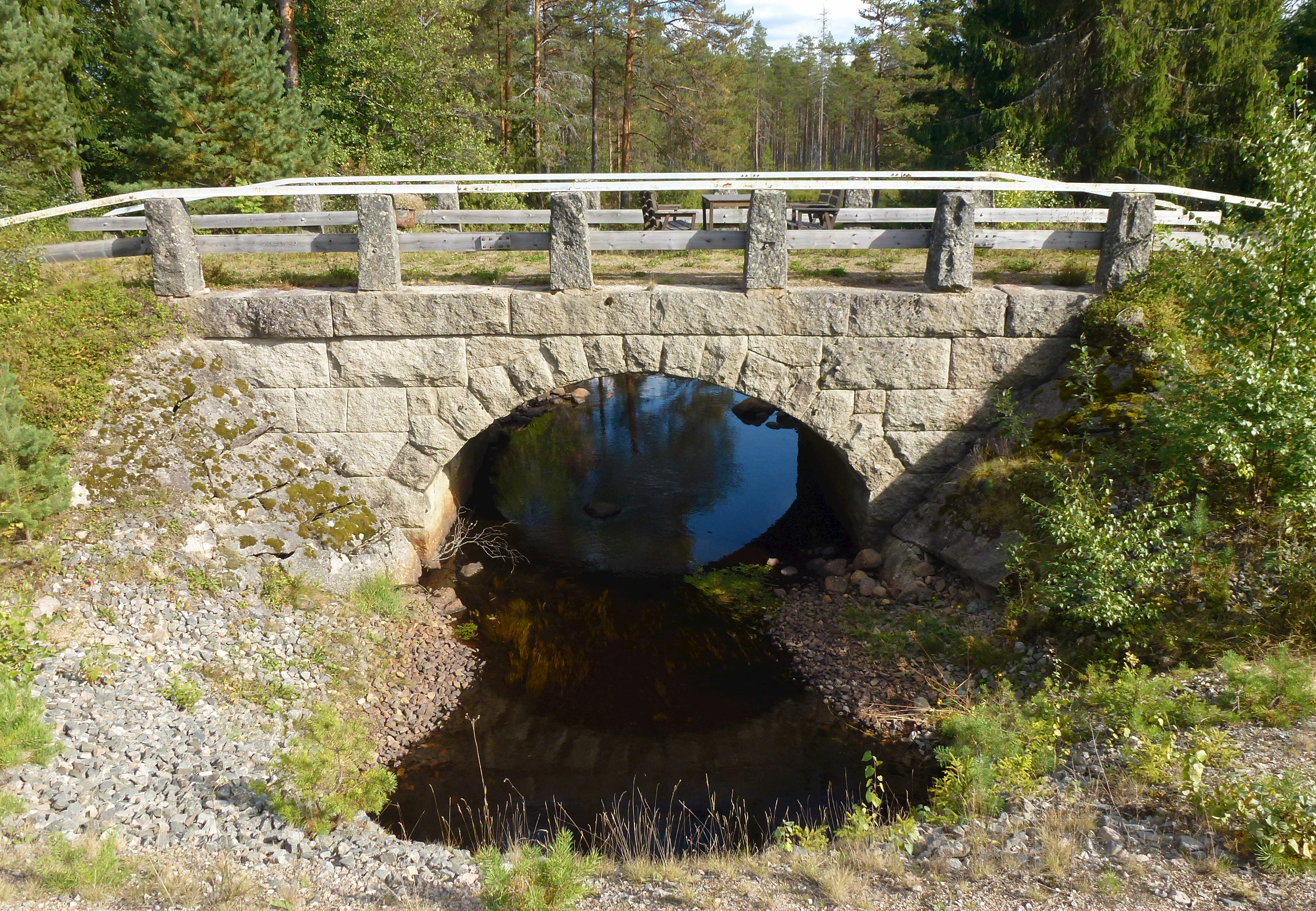 Stenvalvsbron vid Gänsen